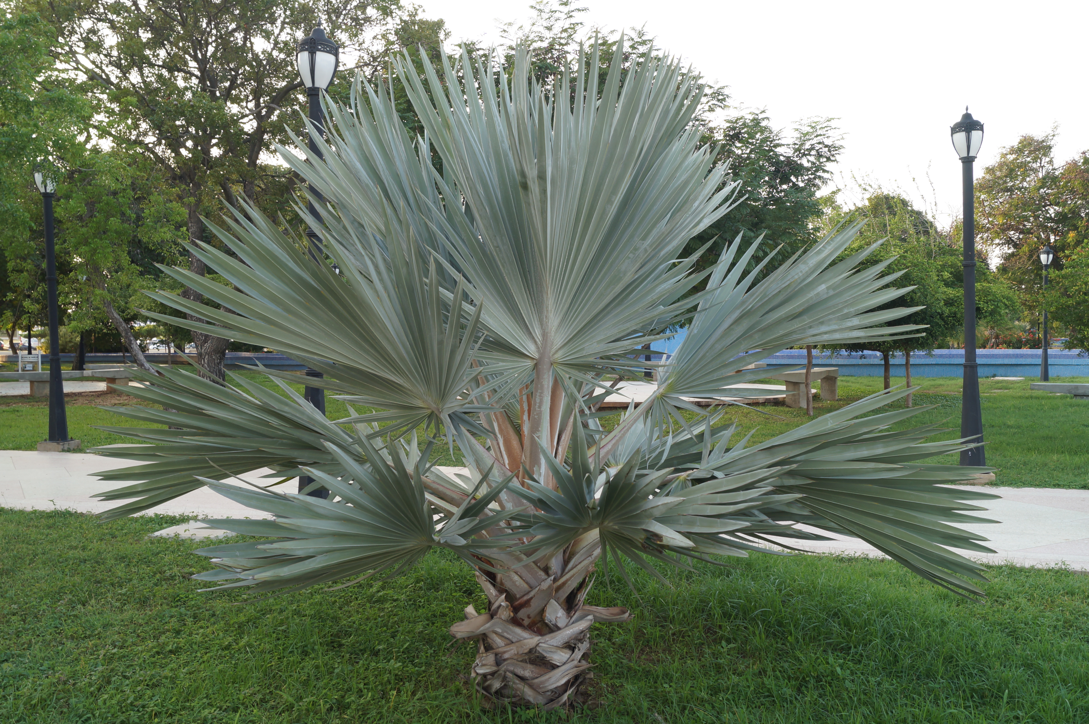 Brahea armata error : this picture is not brahea armata but Bismarckia Nobilis